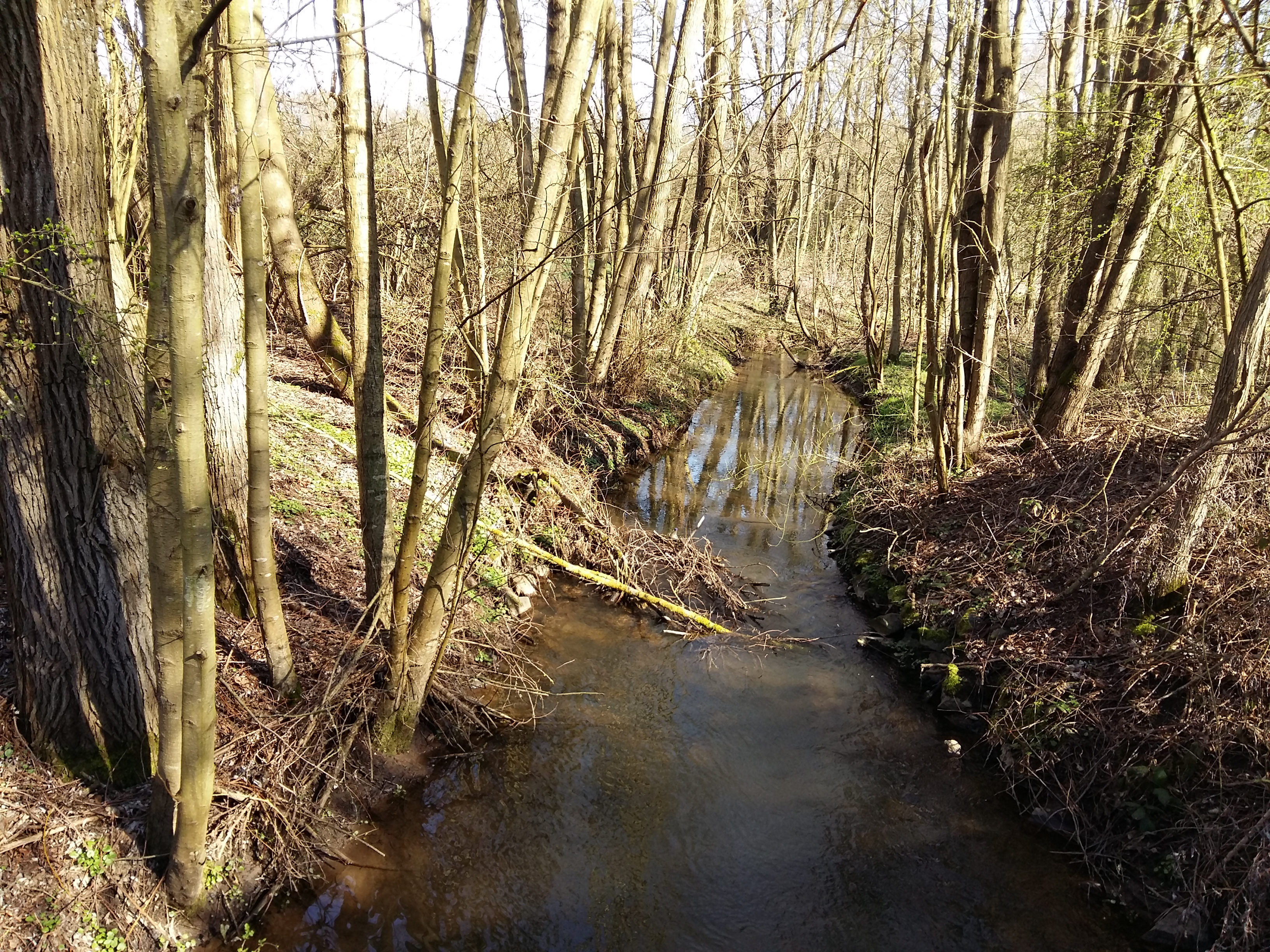 Die Semme ,rechter Nebenfluss der Gersprenz im Semder Wiesengrund, im Frühling